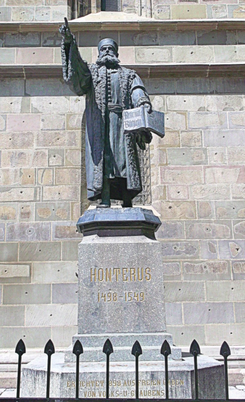 Braszów, pomnik Johannesa Honterusa